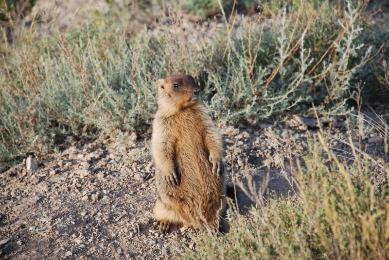 Детеныш байбака.